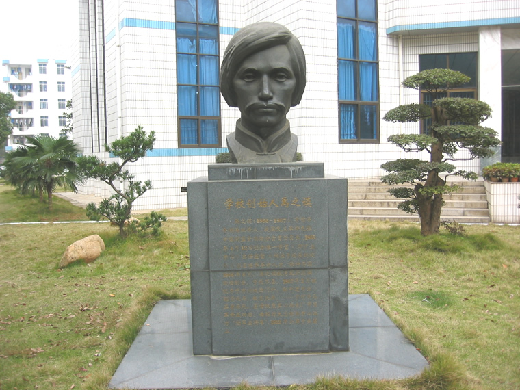 禹之谟雕像，位于湖南师大附中校内。来源于班级同学录，由同学拍摄，获得了授权。